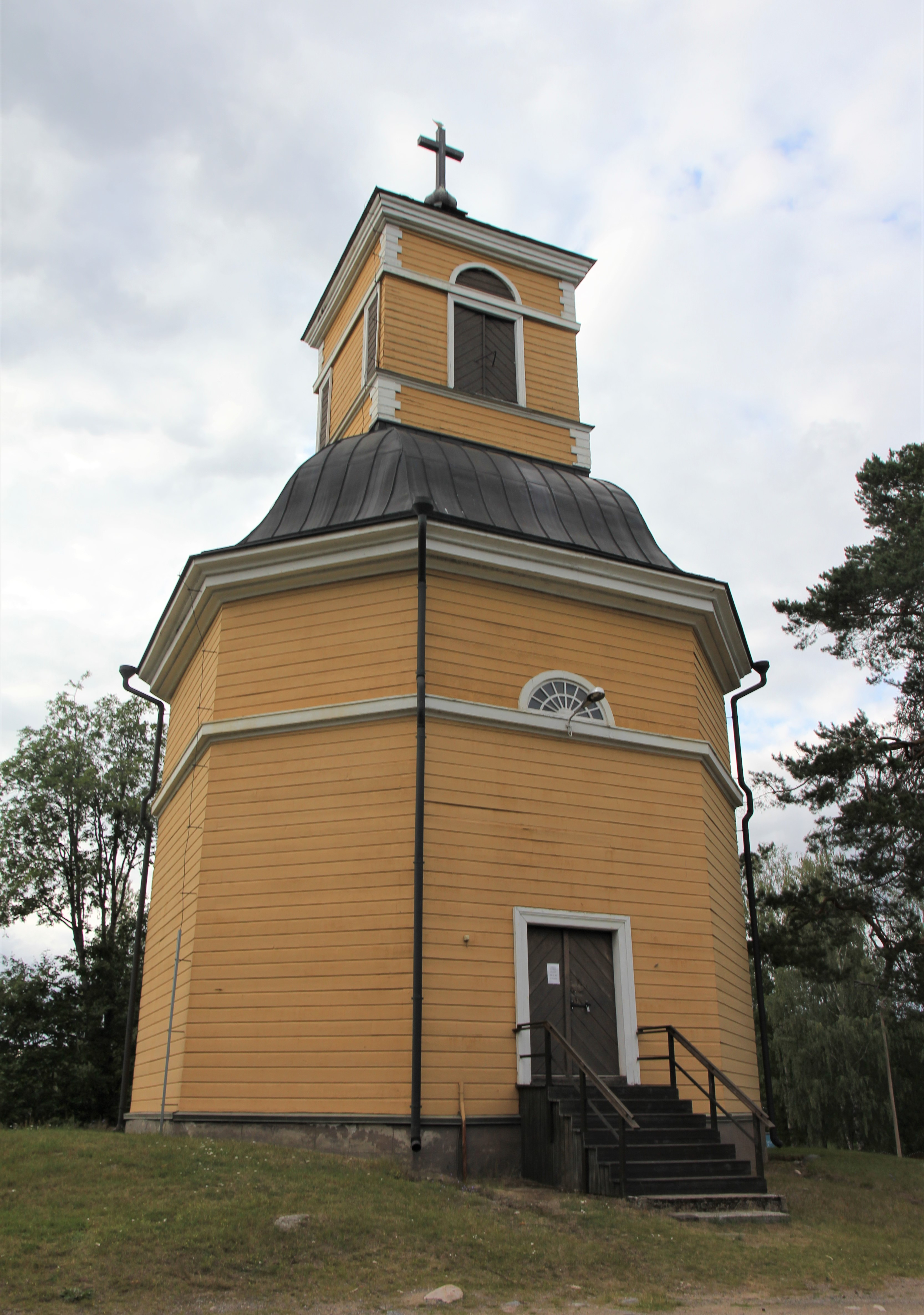 Mäntyharjun kirkon puinen tapuli vuodelta 1819. Rakennuksen suunnitteli Suomen intendenttikonttori, jossa piirrustukset signeerasivat intendentti C. Bassi ja konduktööri A. W. Arppe vuonna 1818. Mäntyharjun vanhaan keskustaan kuuluvan kellotapulin ja Mäntyharjun kirkon osoite on Mäntyharjuntie 22, Mäntyharju. Lisätietoa: Ulla Rahola: Mäntyharjun kirkon korjaus ja restaurointi. Rakennushistoriallinen selvitys 29.5.2017 (pdf)